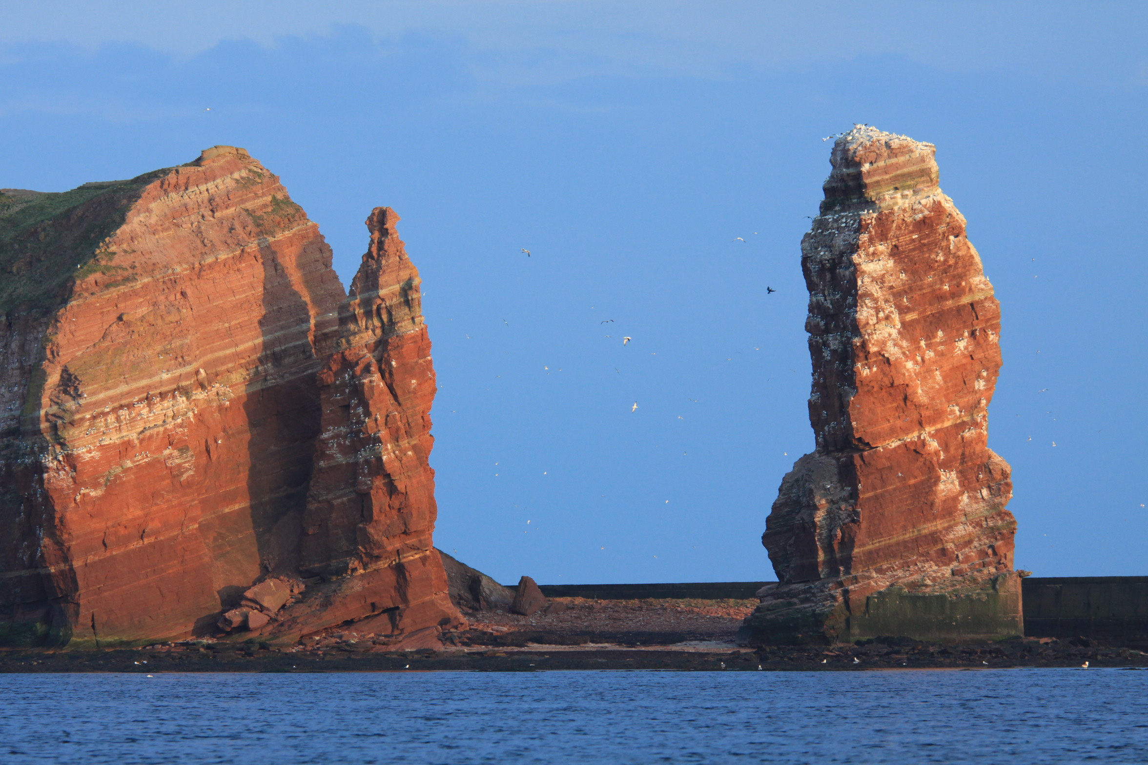 Naturdenkmal "Lange Anna" Helgoland – Die Aufnahme enstand bei einer abendlichen Bootsrundfahrt um die Insel Helgoland von Norden aus.